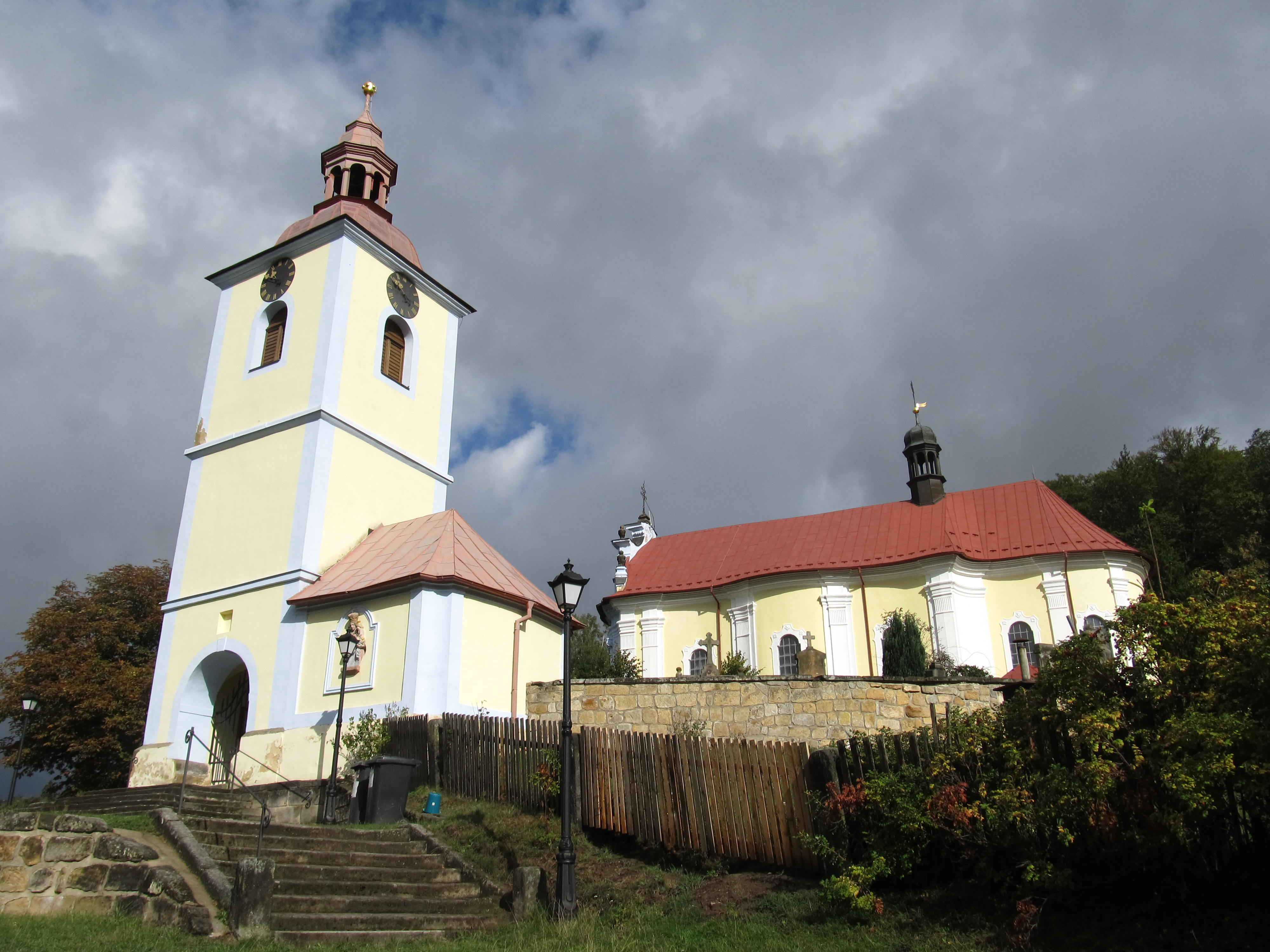 Horní Prysk, kostel sv. Petra a Pavla